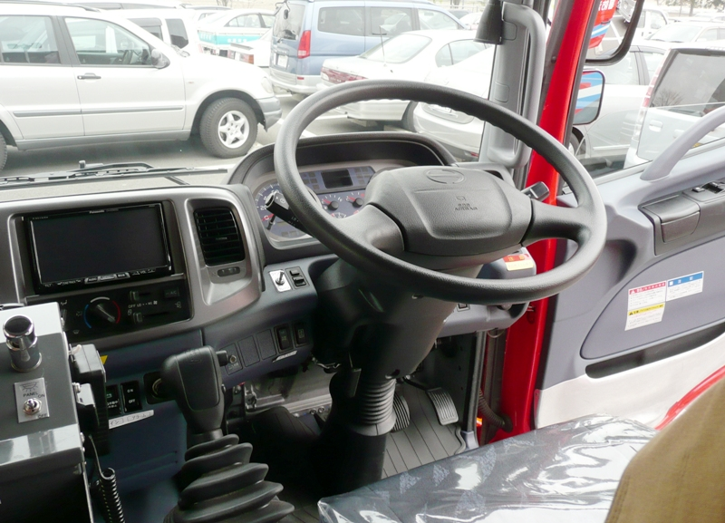 Hino ranger cookpit.